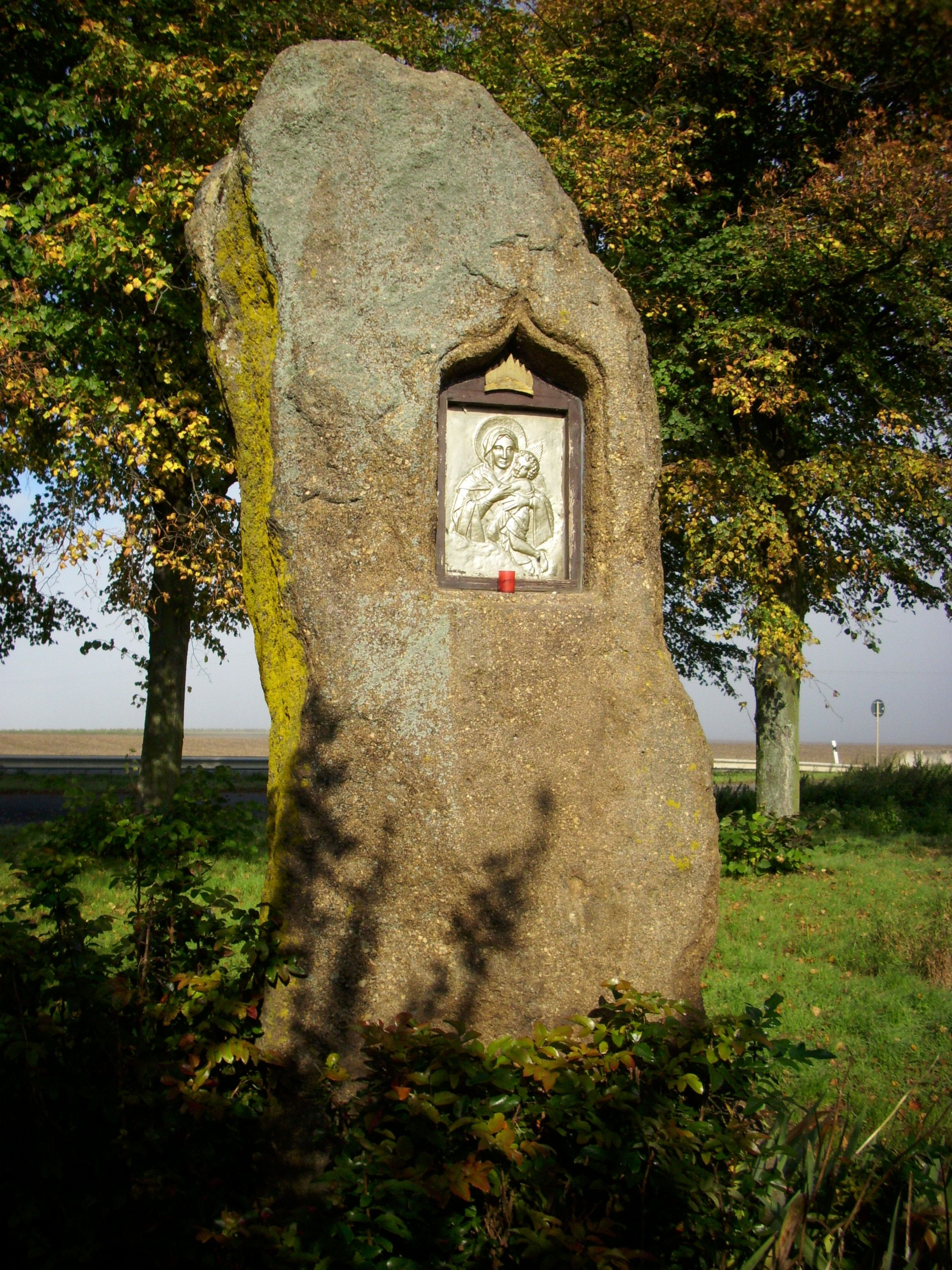 bronzezeitlicher Menhir, um 1500 v. Chr.; spätgotische Figurennische